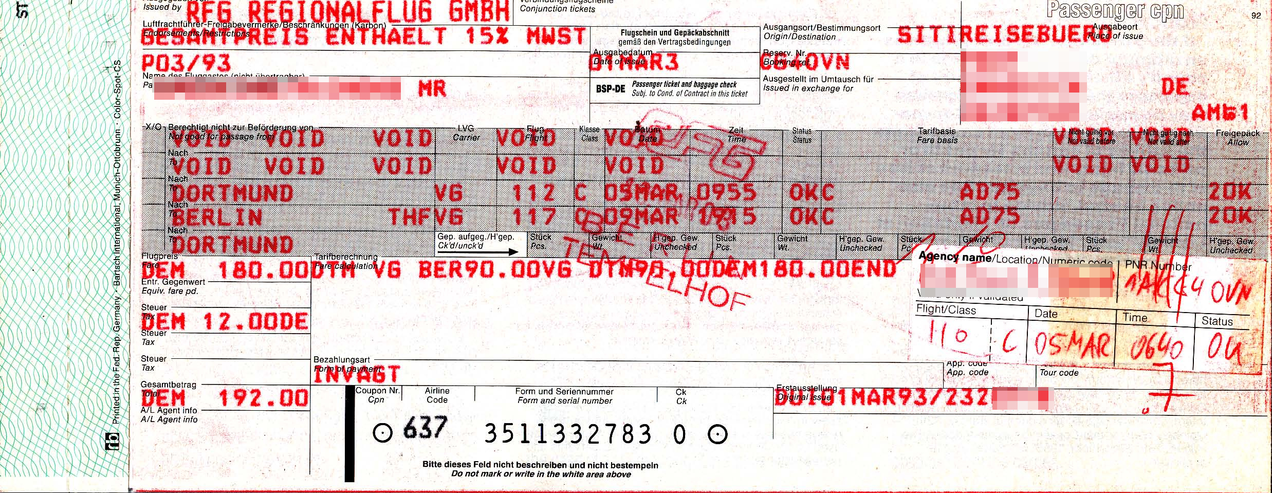 Flugticket, ausgestellt im Namen der RFG Regionalflug GmbH für die Strecke Dortmund - Berlin-Tempelhof - Dortmund. Abgerechnet durch den BSP Deutschland (BSP-DE), gedruckt über der START-Amadeus-System (erkennbar an dem vertikal stehenden Kürzel ST oben rechts). Ticketart: TAT (Transitional Automated Ticket). Tarif: AD75 - d.h. 75 % Ermäßigung auf den Flugpreis für Mitarbeiter eines Reisebüros.